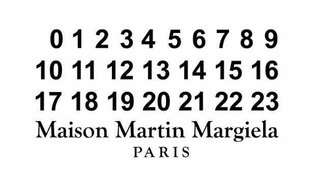 Maison Martin Margiela logo